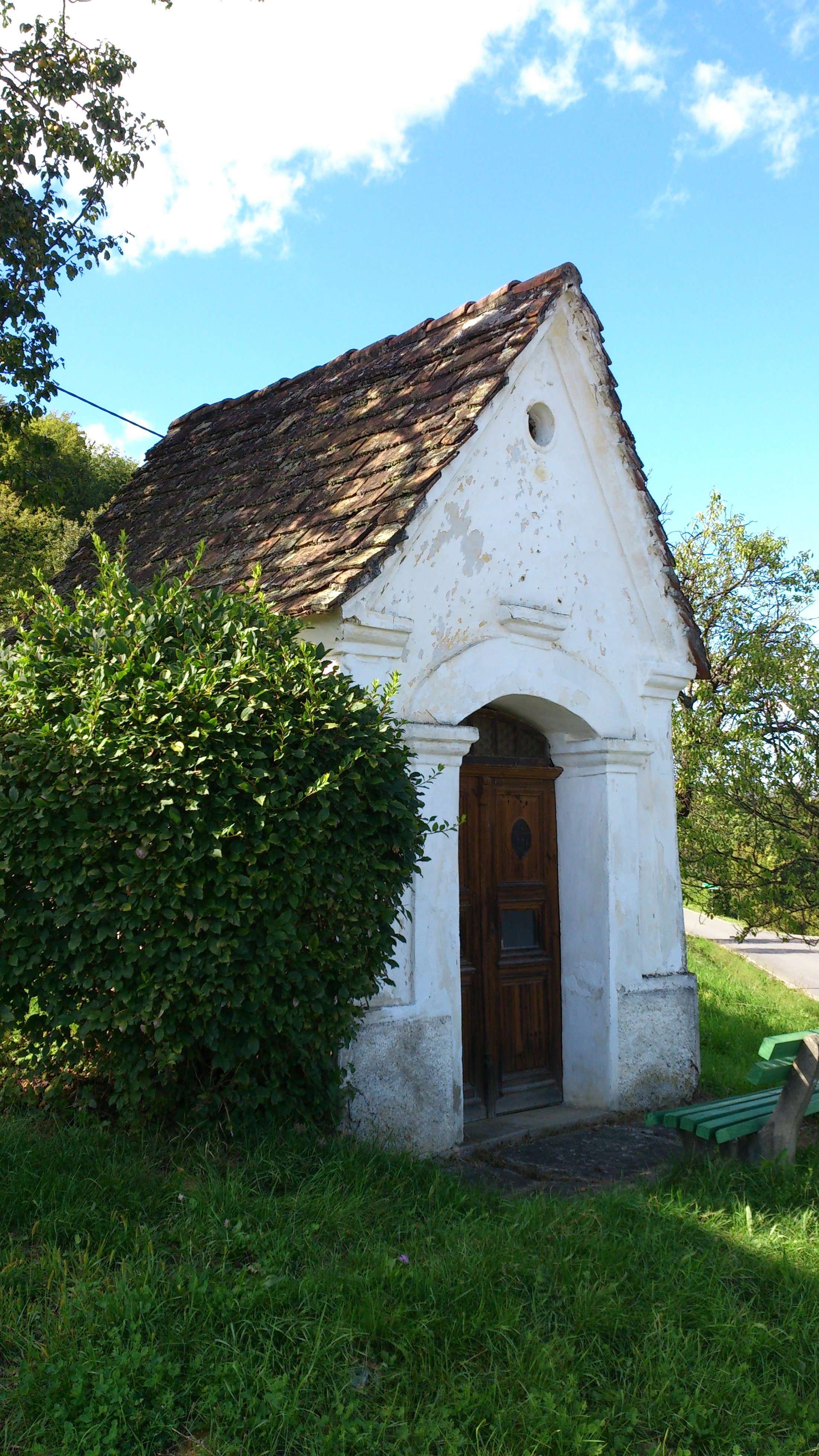 Flur-/Wegkapelle